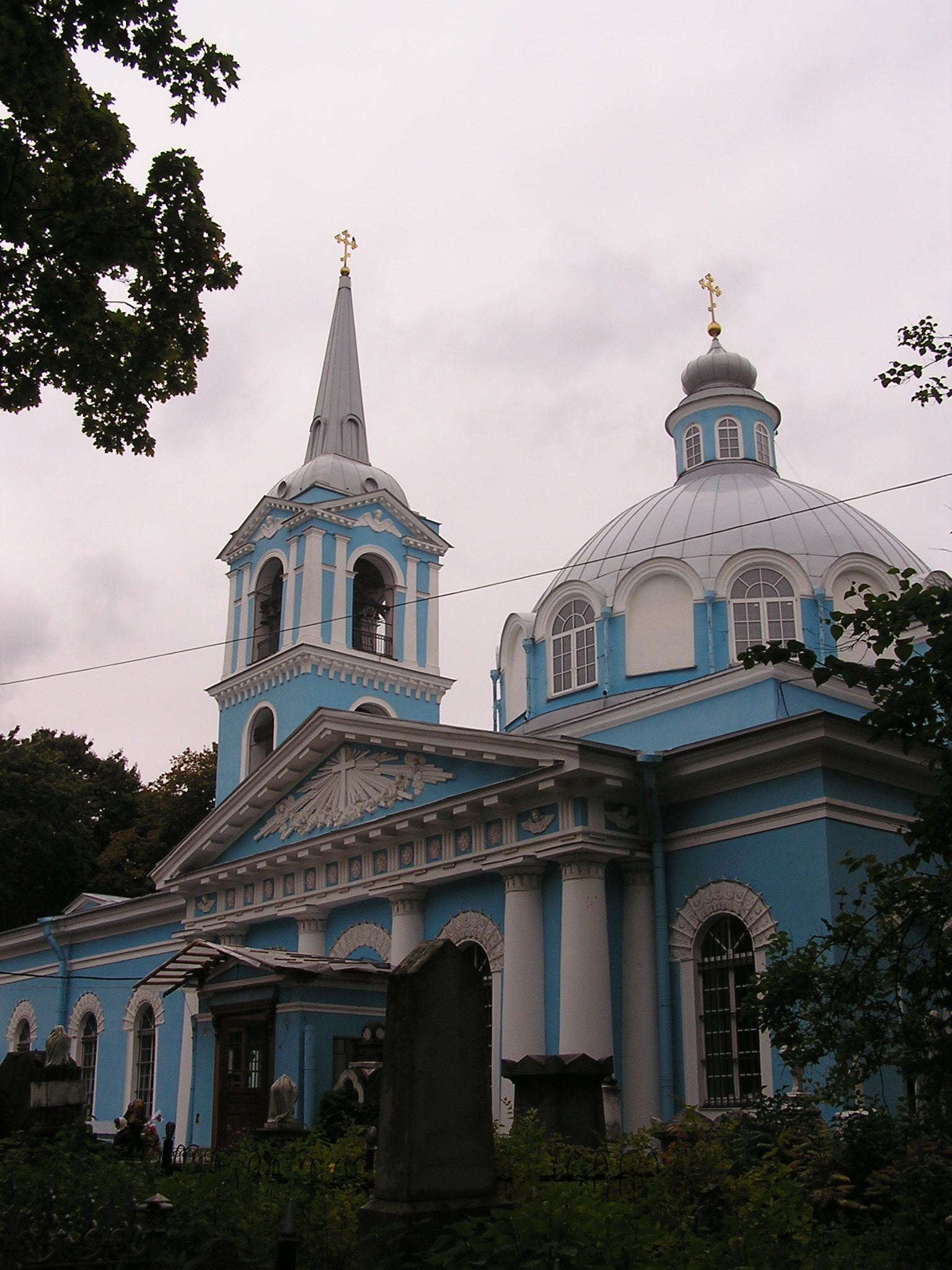 Санкт-Петербург. Смоленское православное кладбище. Церковь Смоленской иконы Божией матери